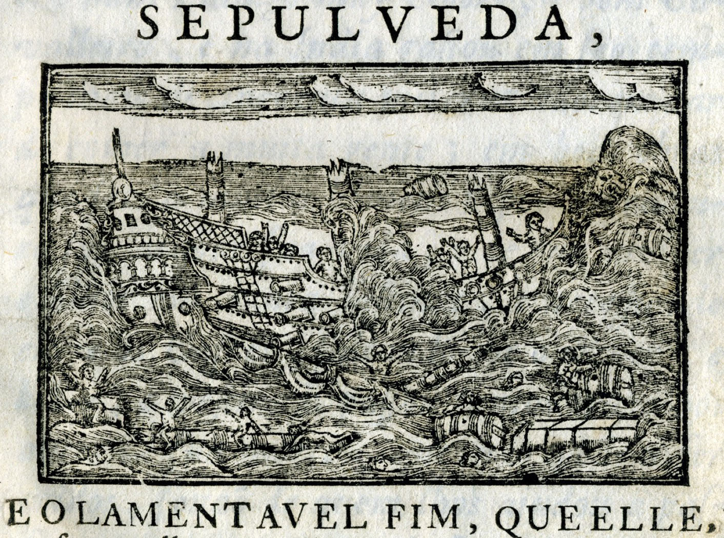 in Bernardo Gomes de Brito, Historia Tragico-Maritima, tomo 1°Lisboa occidental, 1735